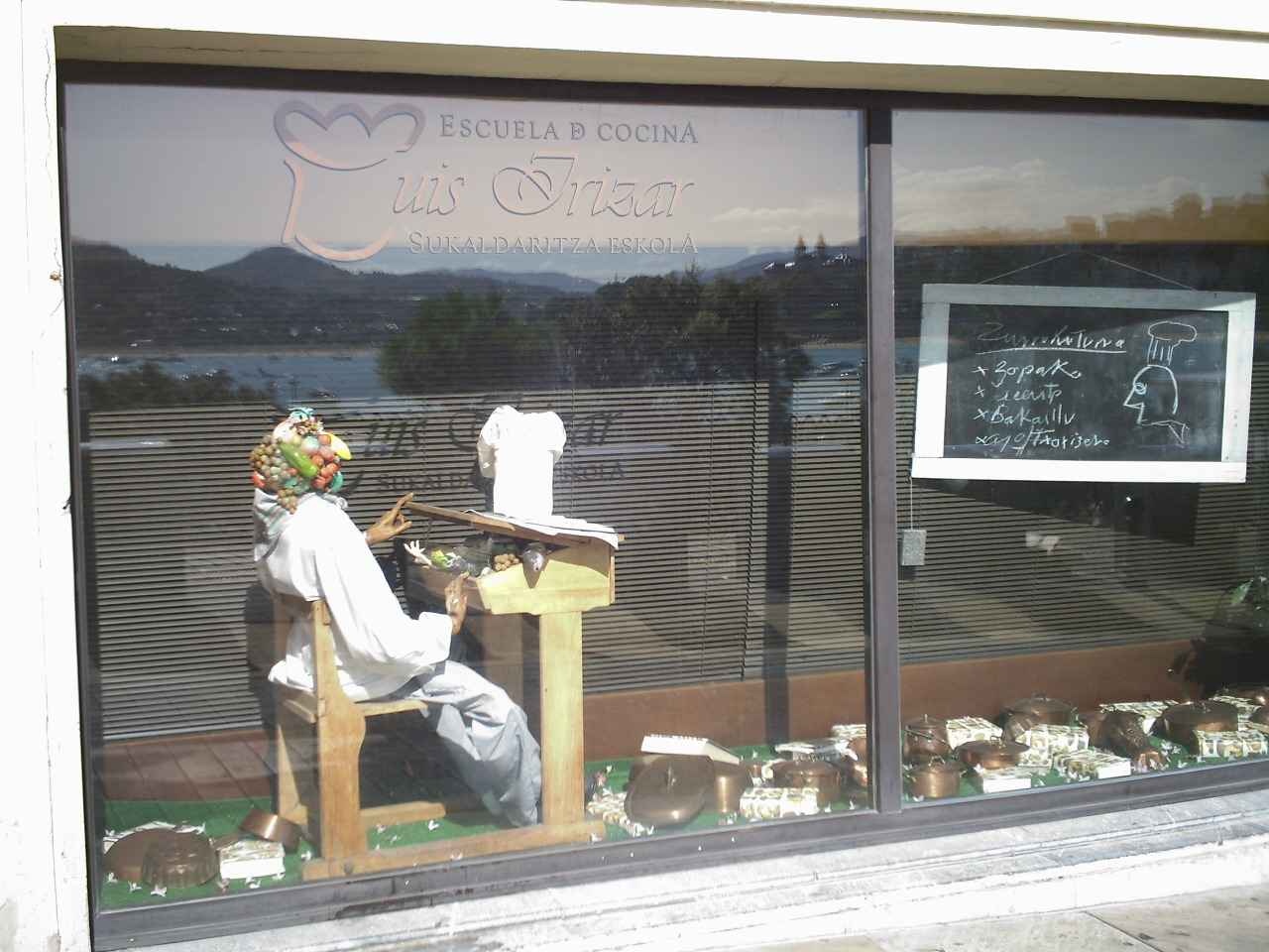 Escuela de Cocina de Luis Irizar, padre de la moderna gastronomía vasca, situada en el puerto de Donostia, (País Vasco, España).